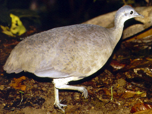 Great Tinamou, Tinamus major. Location: La Selva Biological Station, Sarapiqui, Costa Rica